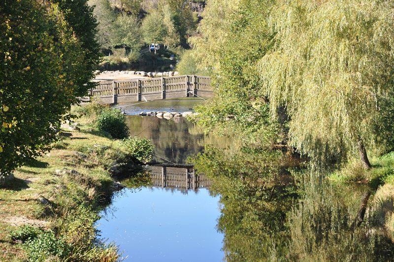 L'Ance du Sud à Saint-Préjet-d'Allier (Haute-Loire)